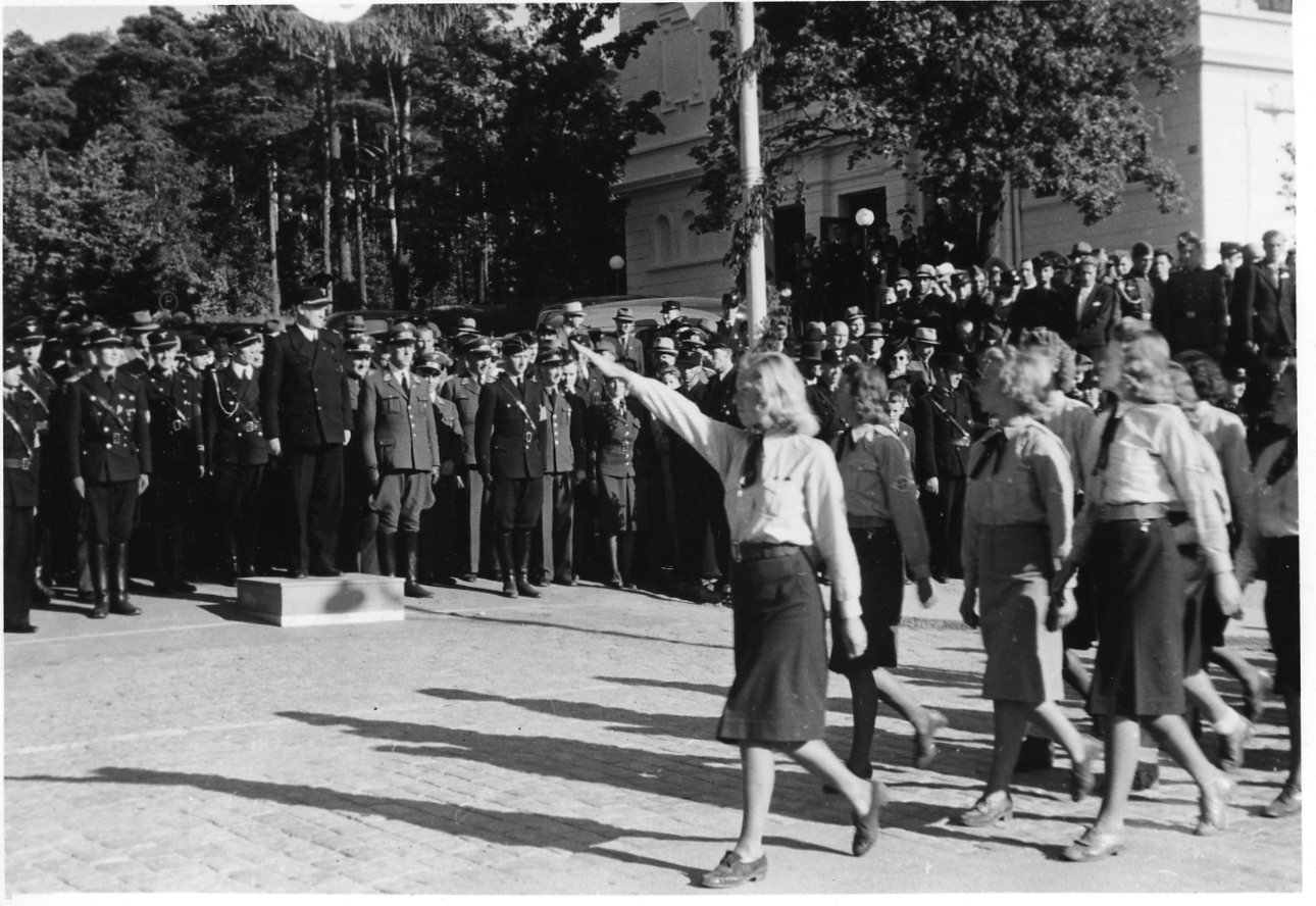 Datering: 1942/07. RA/RAFA-3309/U 41A/3 /41-3-41 img301 Nasjonal Samling, forkortet NS, var et norsk politisk parti som ble grunnlagt av Vidkun Quisling i 1933 og ble oppløst ved frigjøringa i 1945. Partiet la seg etterhvert nært opp mot nasjonalsosialismens ideologi og ble støtteorganisasjon for den tyske okkupasjonsmakta i Norge under andre verdenskrig.